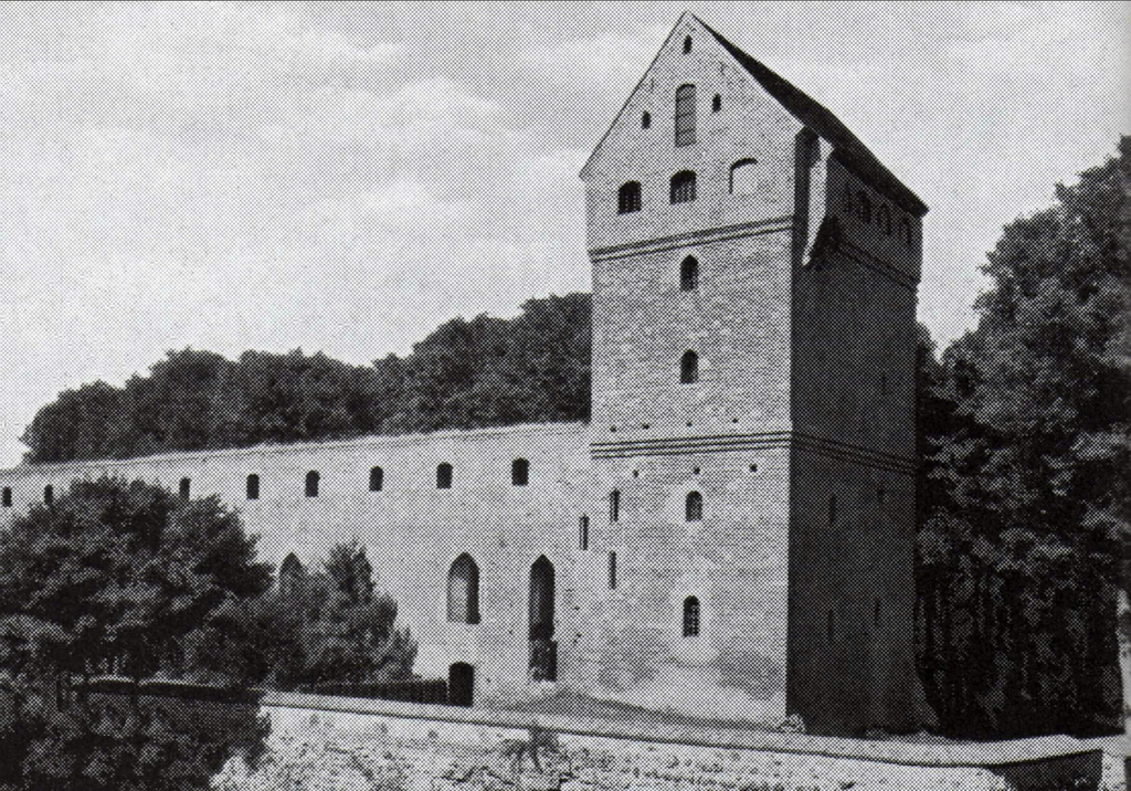 Die Burg Balga in den 1930er Jahren